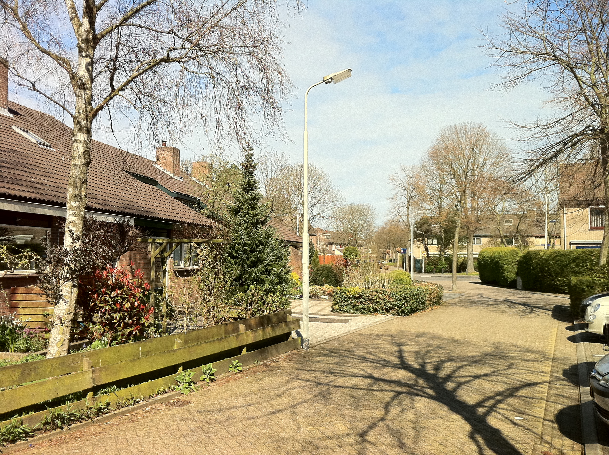 Koog aan de Zaan - Rozenboom